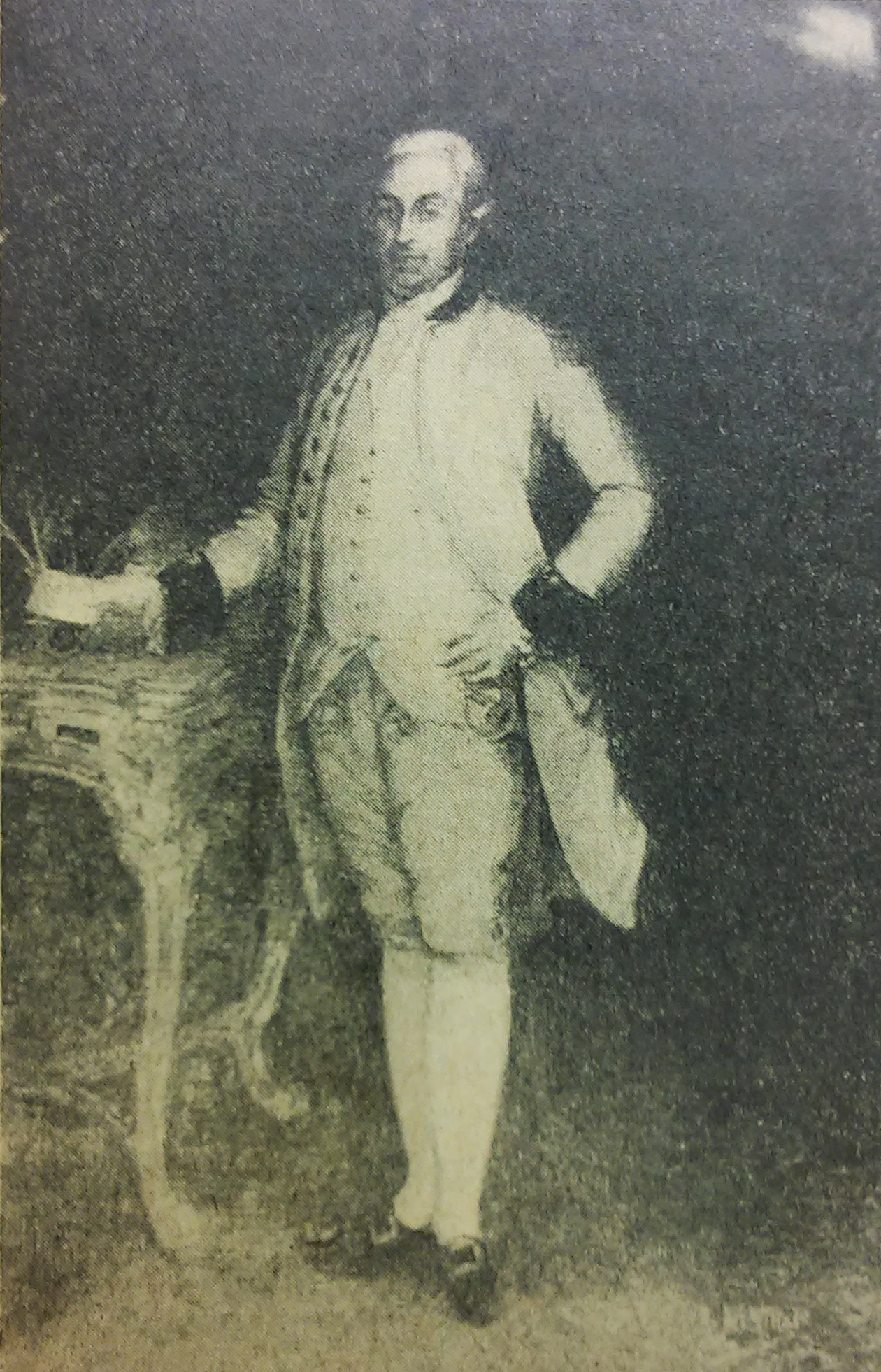 El retrato -que aparece en esta página- fué ejecutado en Madrid en el año 1773 por el artista Ramón Bayón, propiedad del profesor Dardo Corvalán Mendilaharzu. El pintor lo ha representado de tamaño natural, de pie con coleta, uniforme blanco, espadín, casacón y calzón corto. En su diestra sostiene una carta dirigida a don Rafael de Basavilbaso.